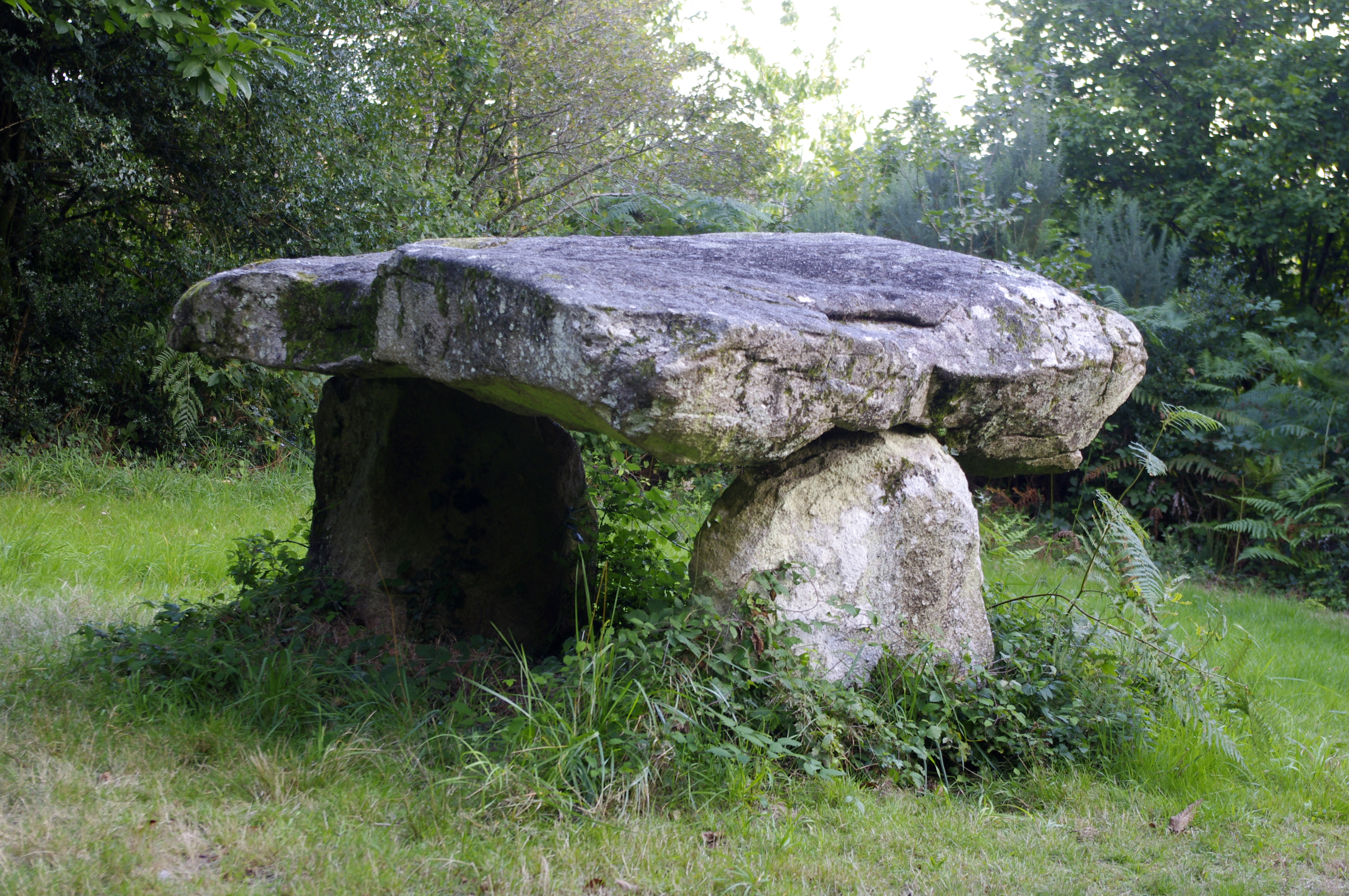 Dolmen de Rouffignac, commune de Javerdat, Haute Vienne